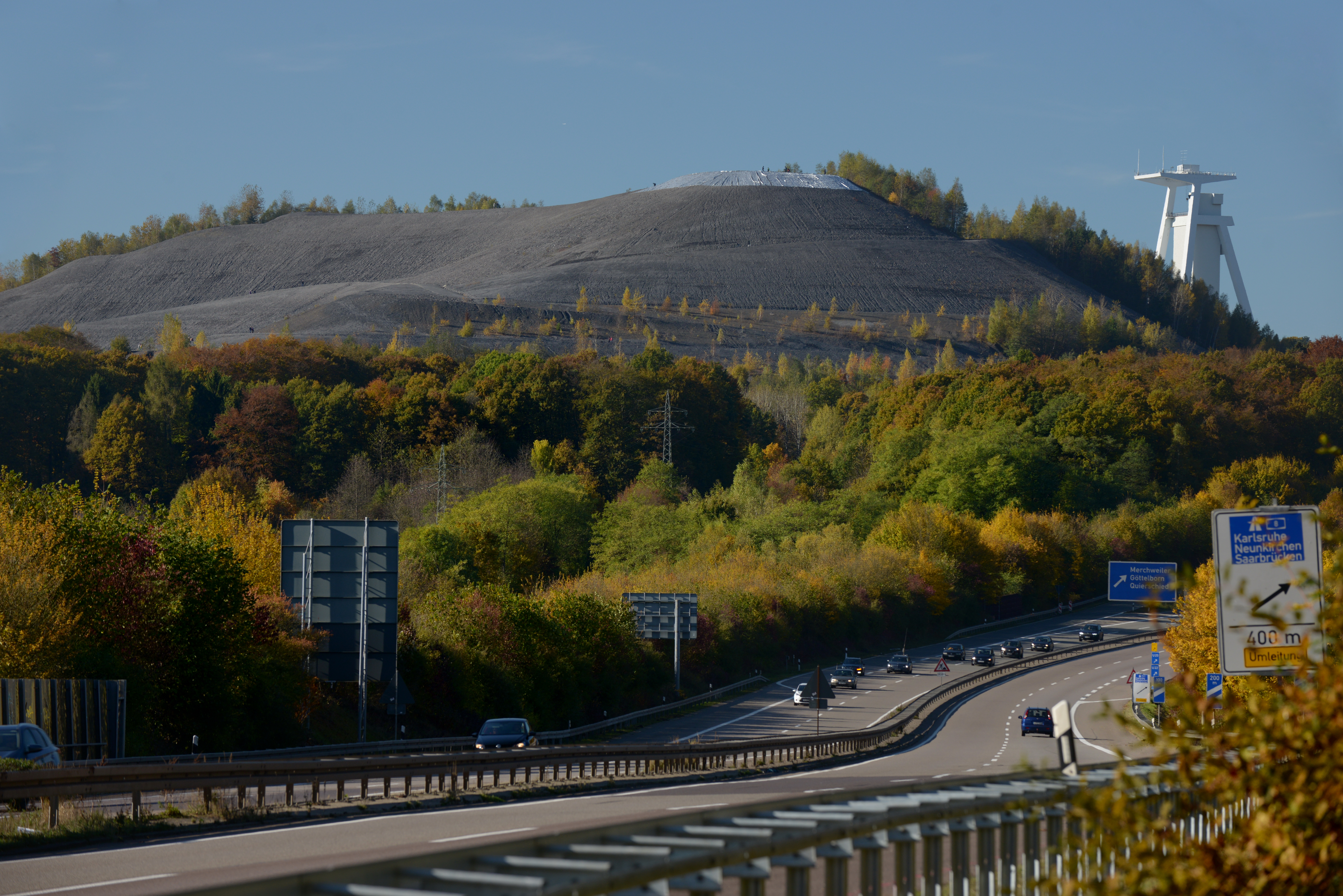 Installation mit weißer Folie mit dem Namen Hell/Dunkel von Architektur-Studenten der Hochschule für Technik und Wirtschaft des Saarlandes (HTW) auf dem Plateau der Bergehalde Göttelborn.